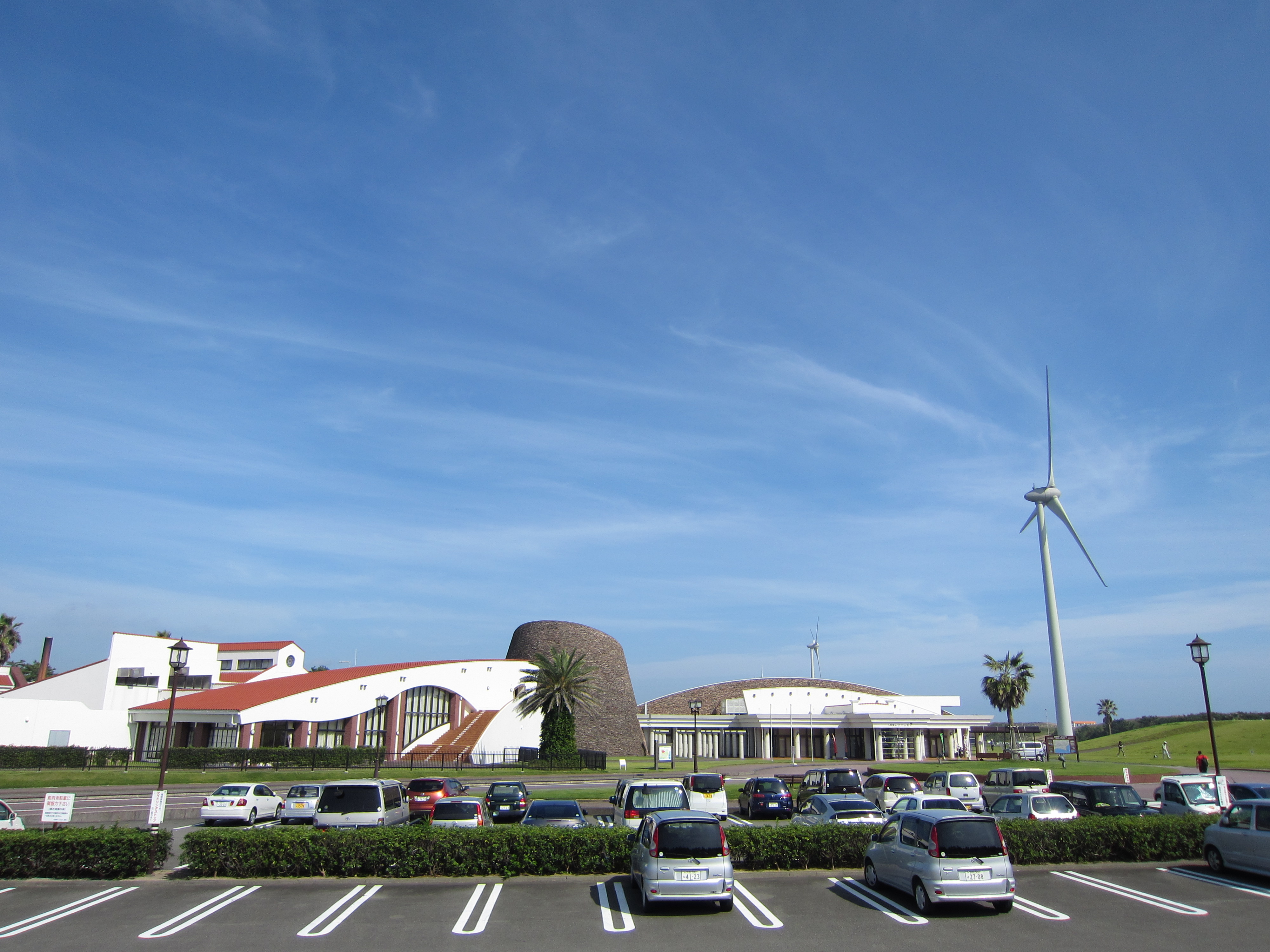 大東温泉シートピア